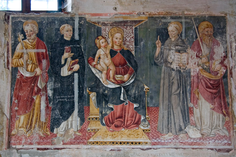 Pieve di San Giovanni, Vespolate (NO) "Madonna in trono col Bambino e Santi" Affresco della parete sinistra